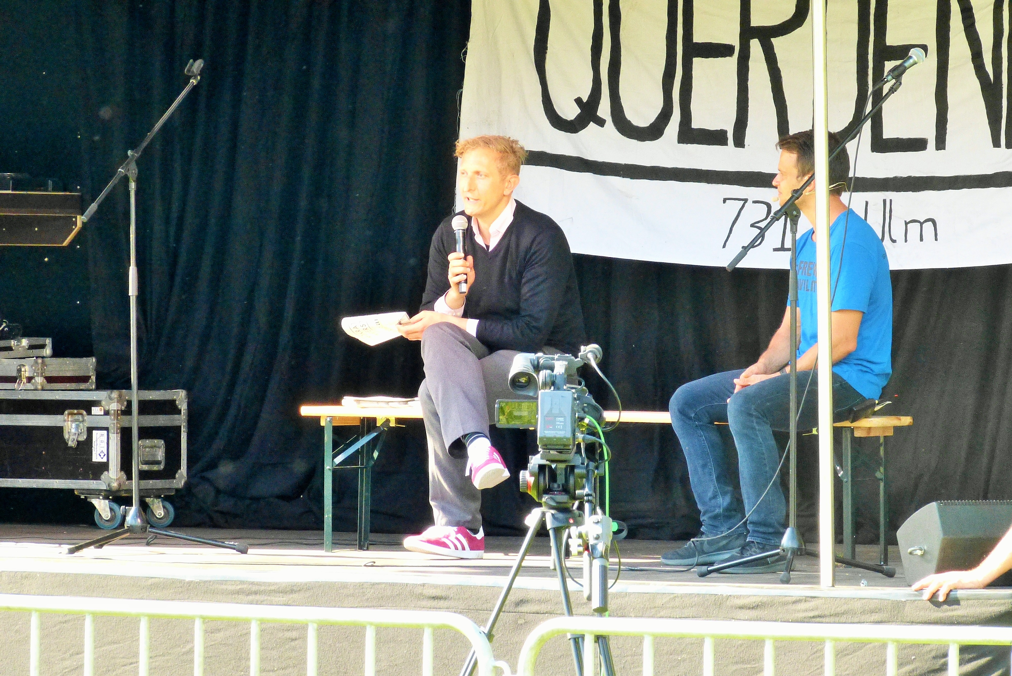 Ulm: Anselm Lenz und Markus Haintz; 2020